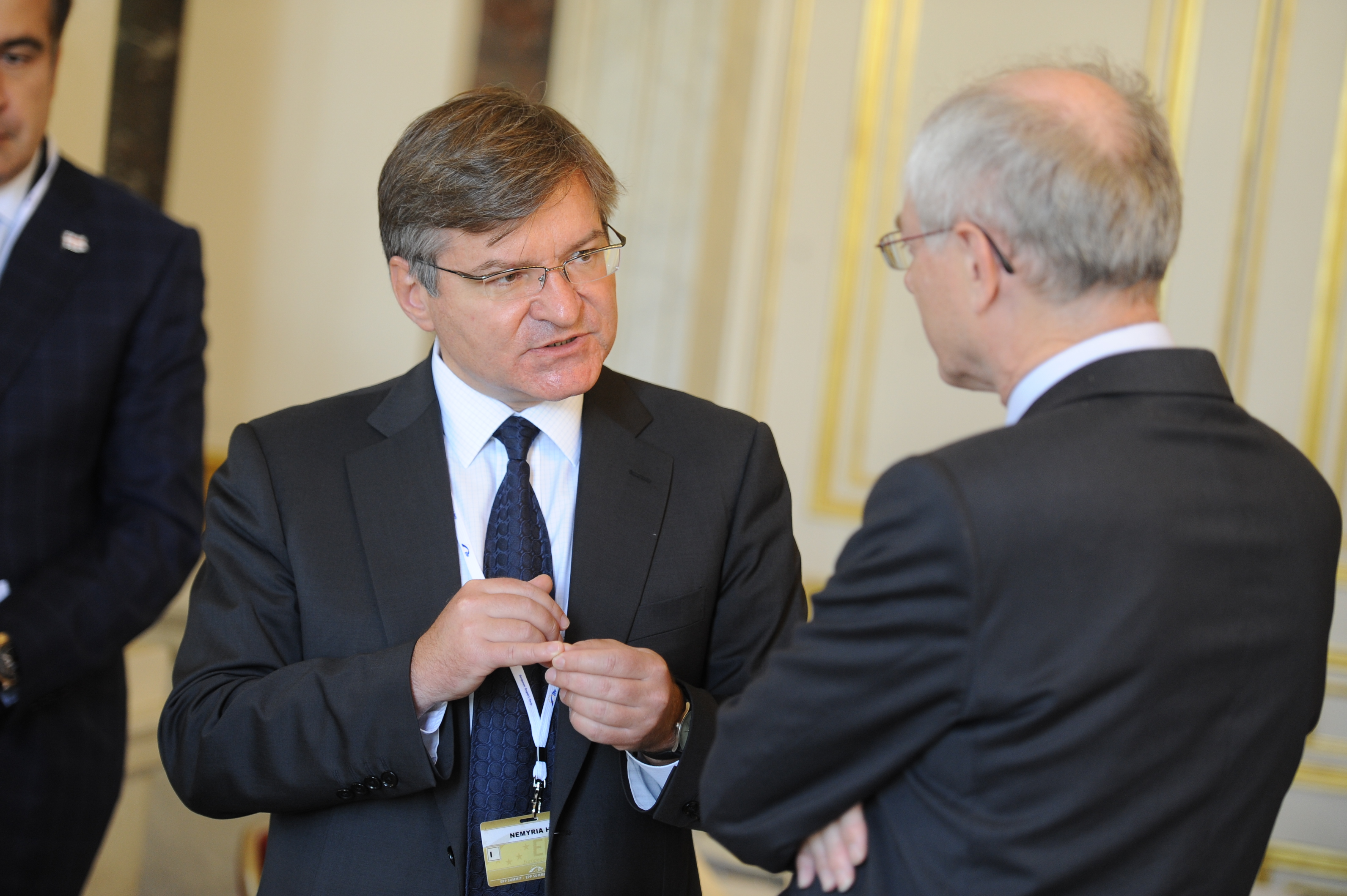 Hrihoriy Nemyria